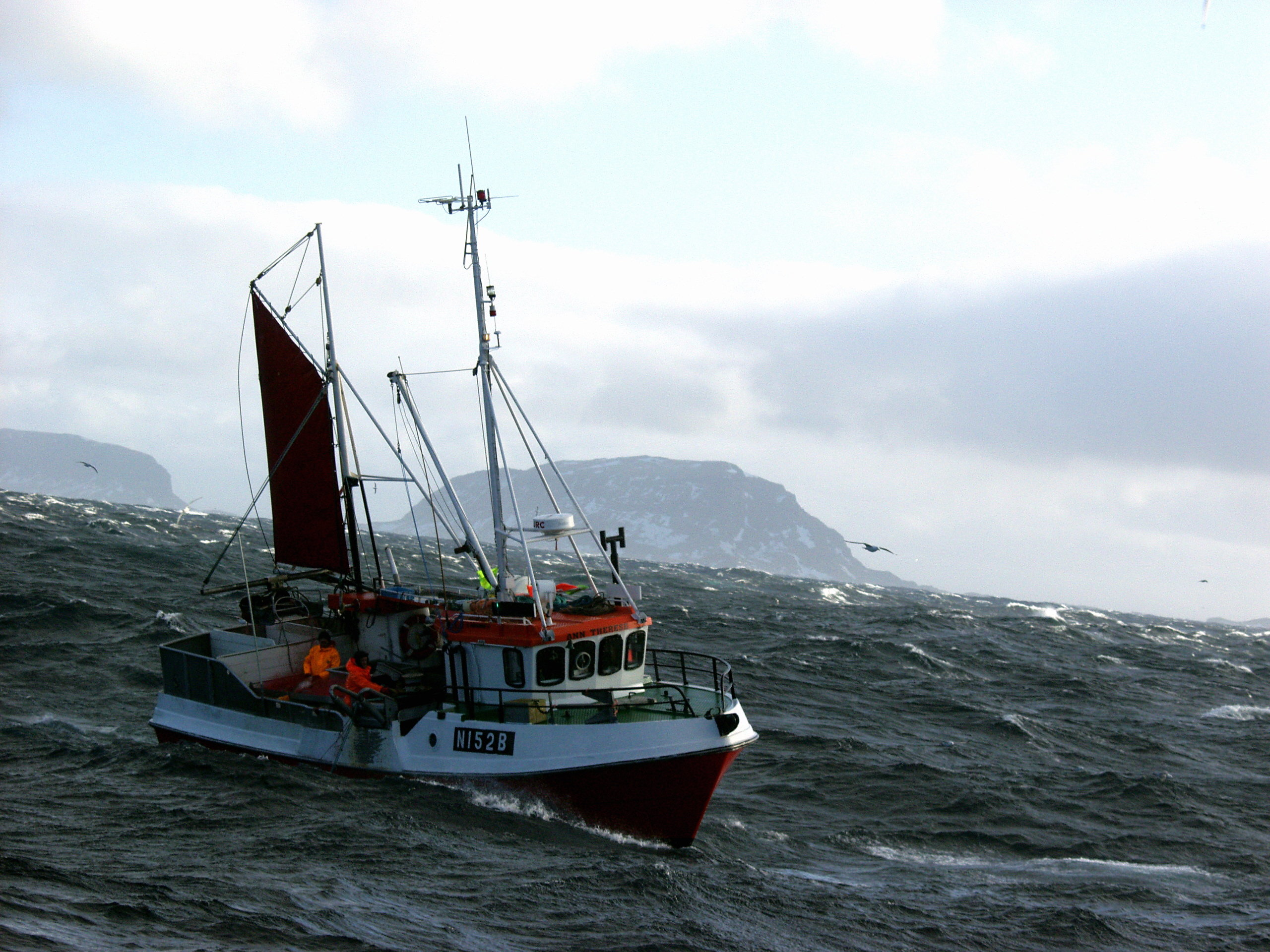 Fiskeskøyte uten for Røst, Lofoten 19.mars 2002.